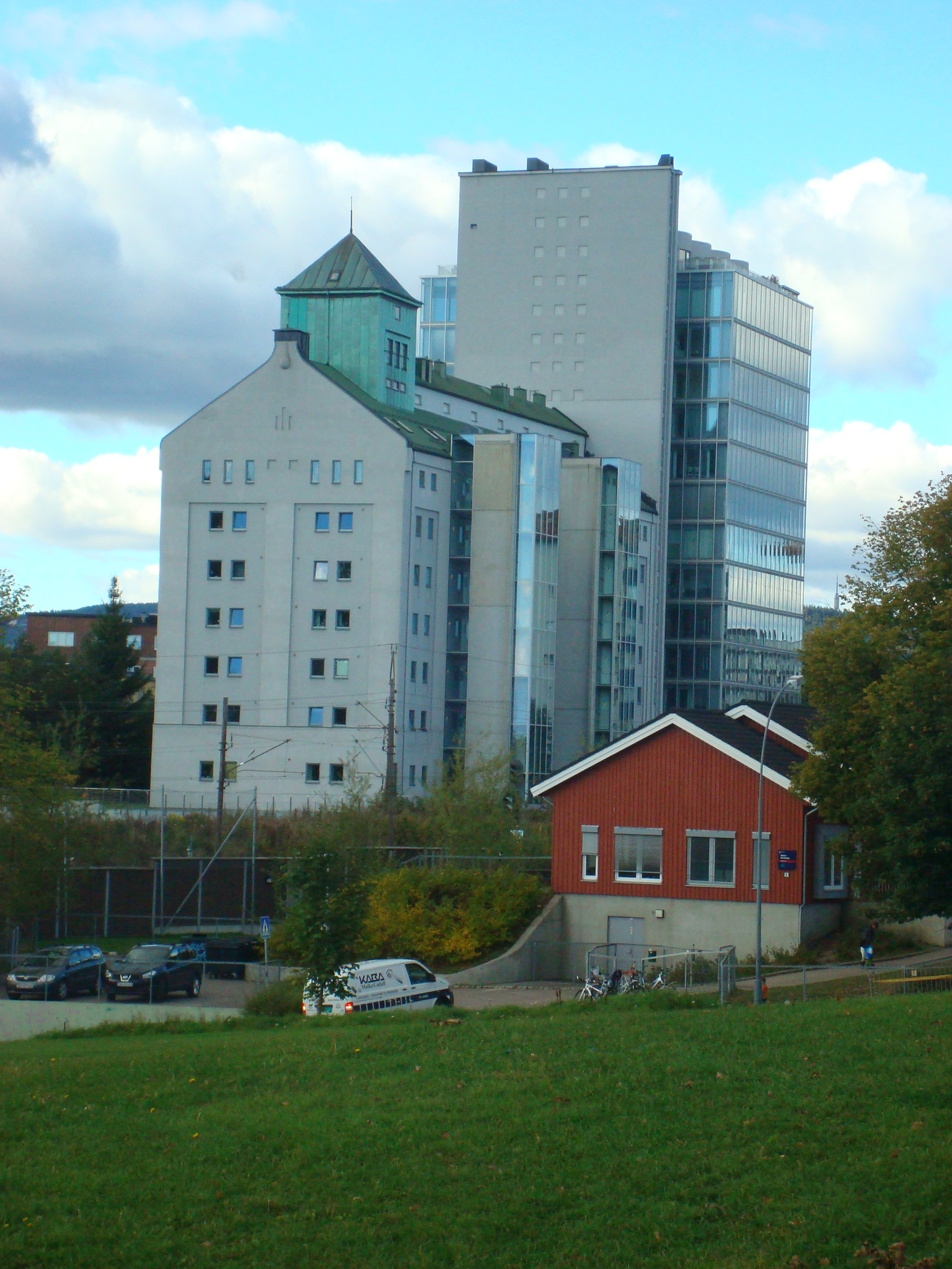 Tidligere Sinsen Kornsilo, nå Sinsen panorama (boliger).